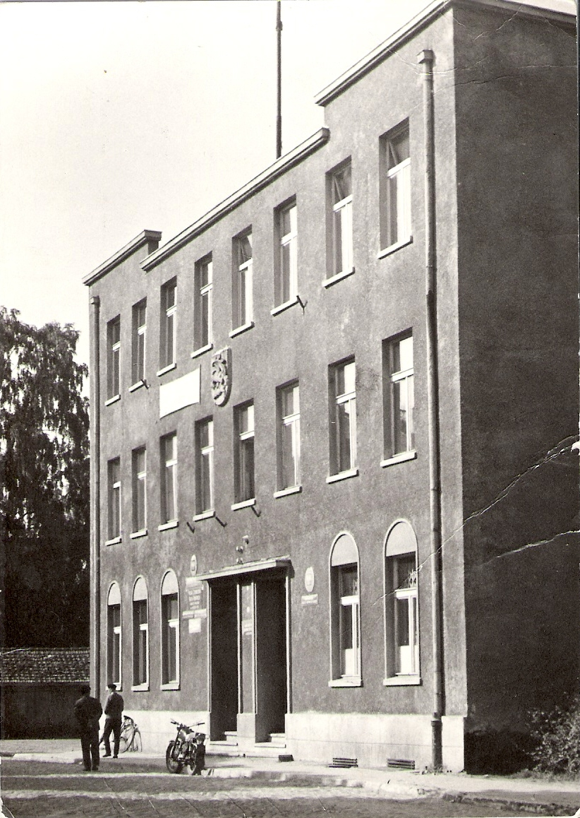 Kalisz Pomorski - ratusz miejski widok z 1968 roku